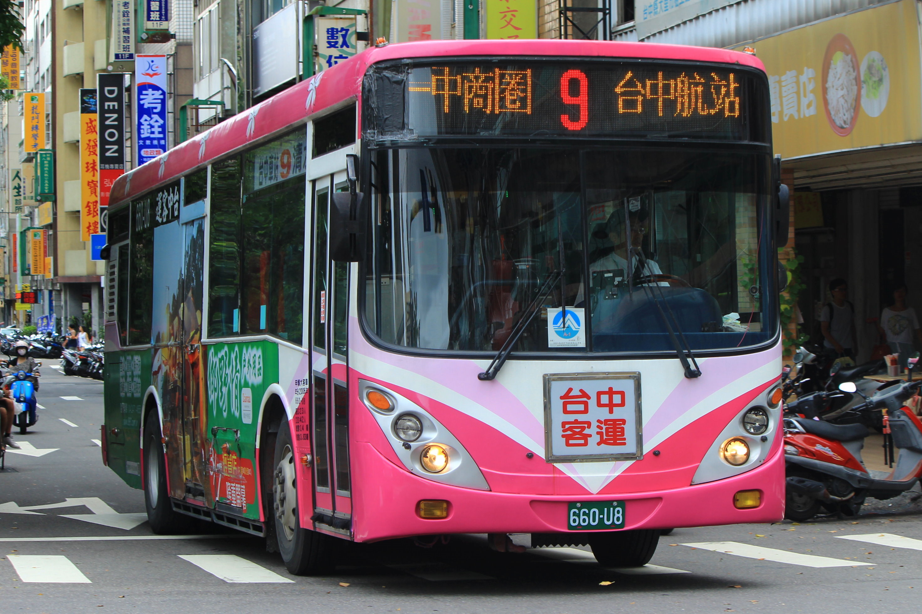 中文（台灣）: 9 綠川東站